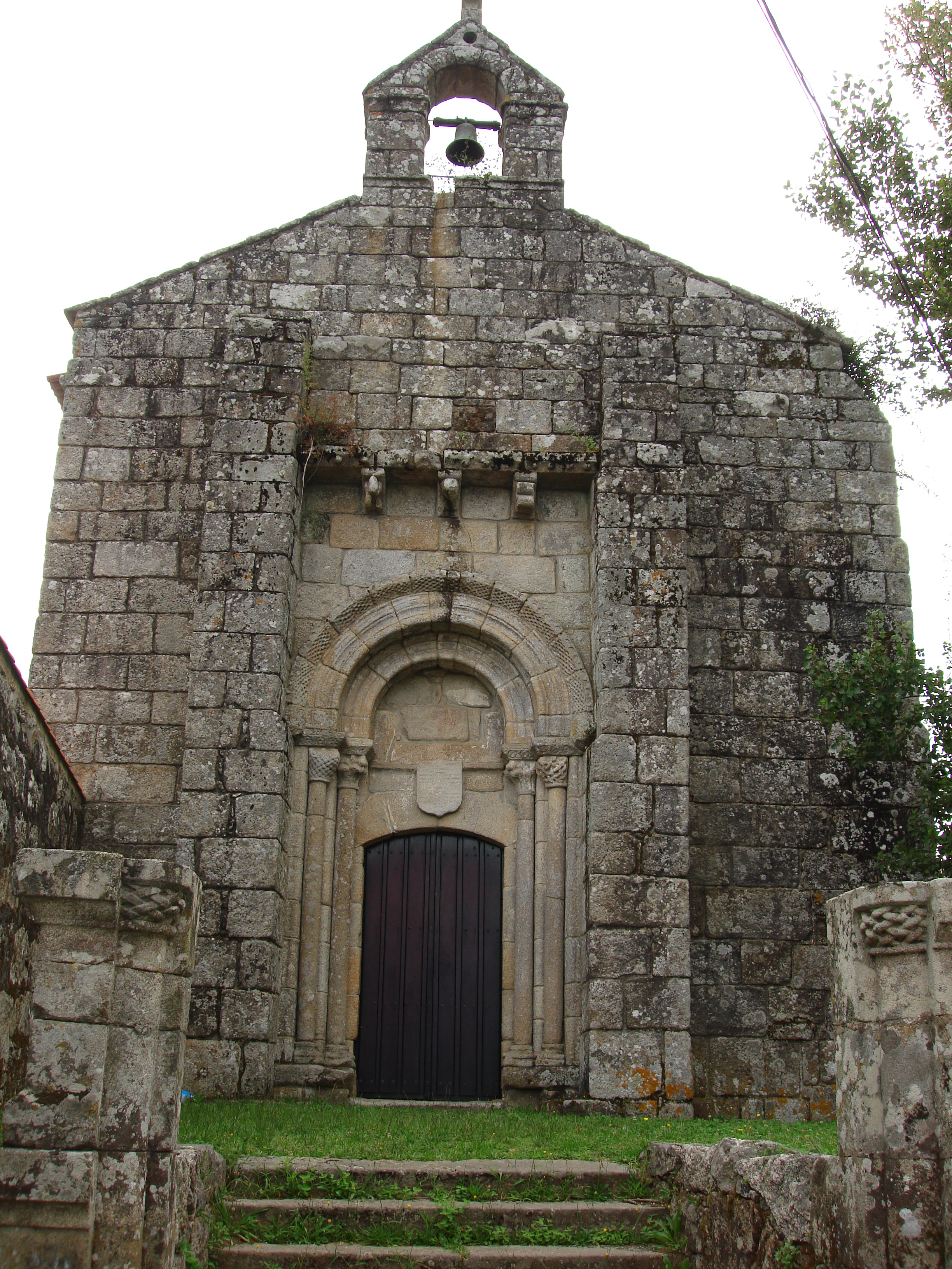 fachada de la capilla de Santas María do Mosteiro, en Meis (Pontevedra)